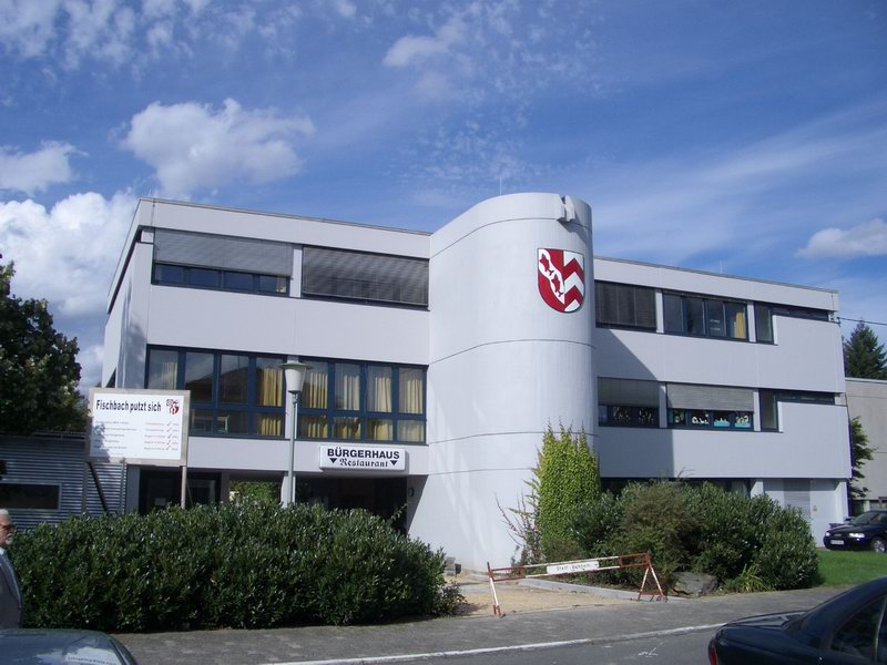 Das Bürgerhaus von Kelkheim-Fischbach bei Frankfurt am Main diente der bis 1977 selbständigen Gemeinde als Rathaus.